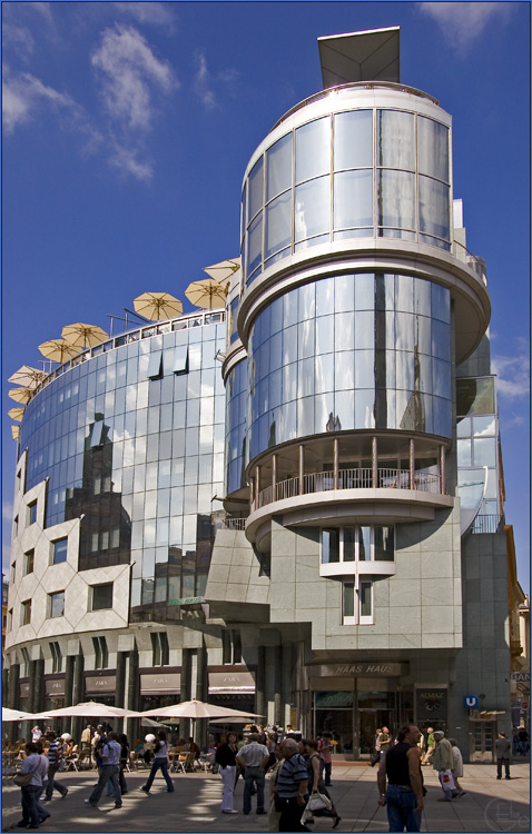 das Haashaus am Stephansplatz